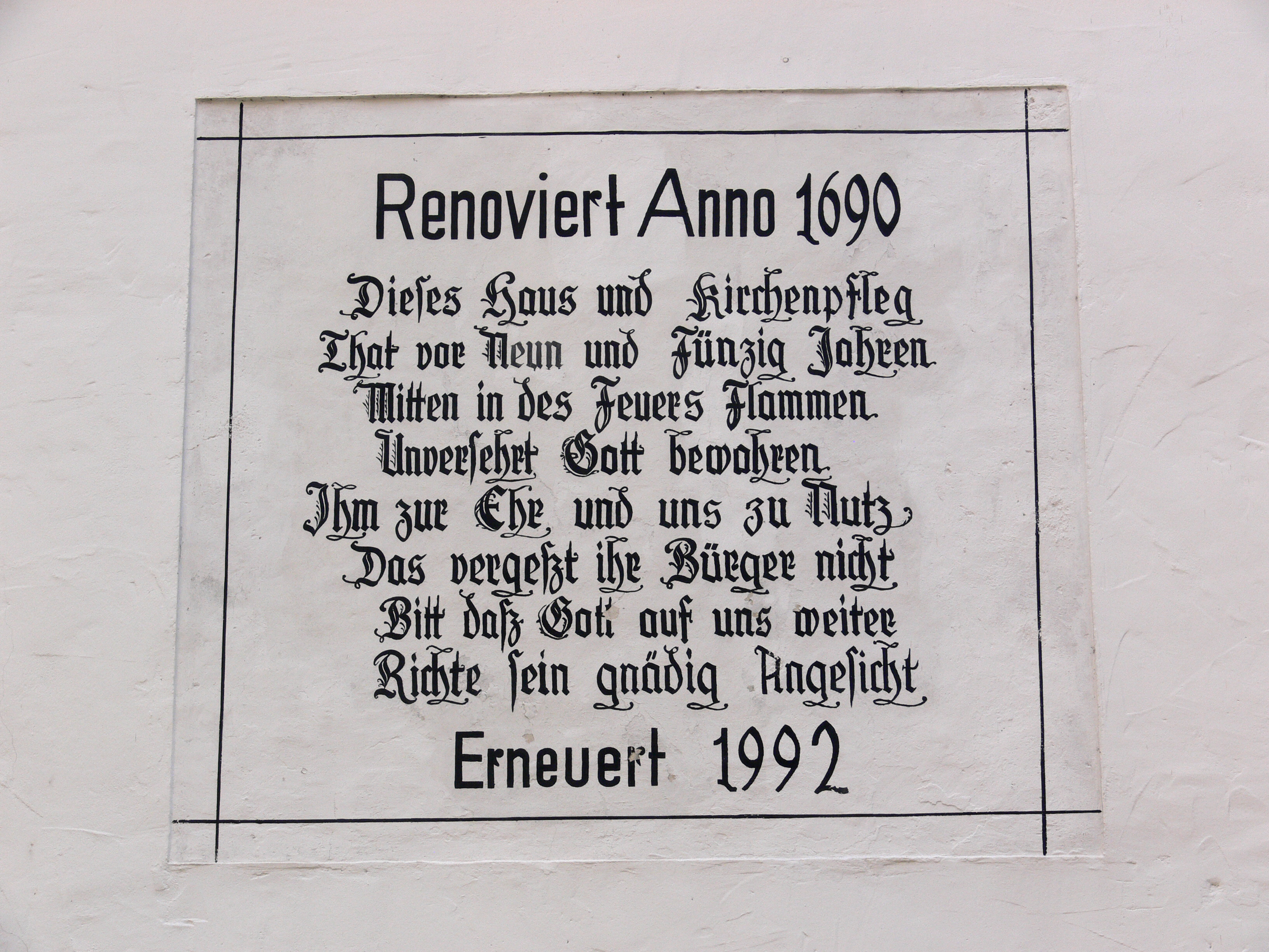 Isny im Allgäu, Nikolaikirche, eine Inschrift